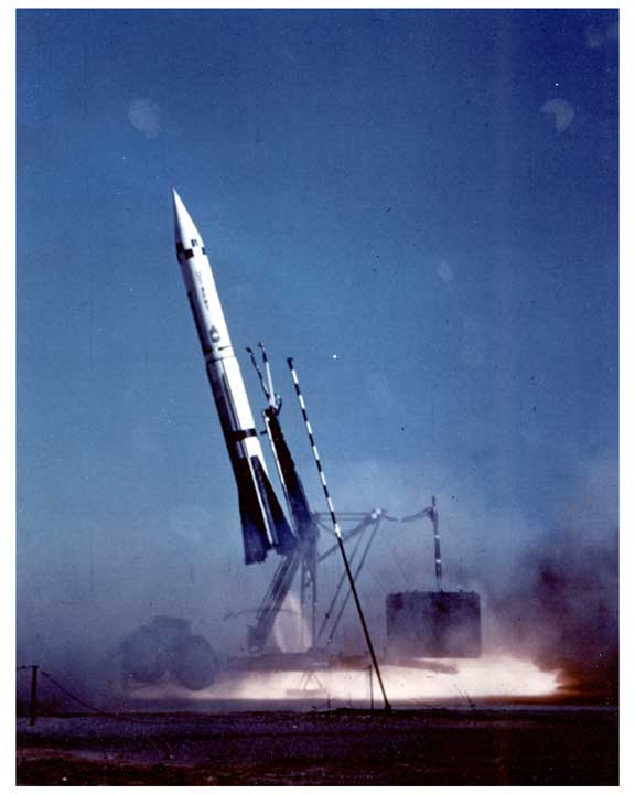 MGM-29 Sergeant